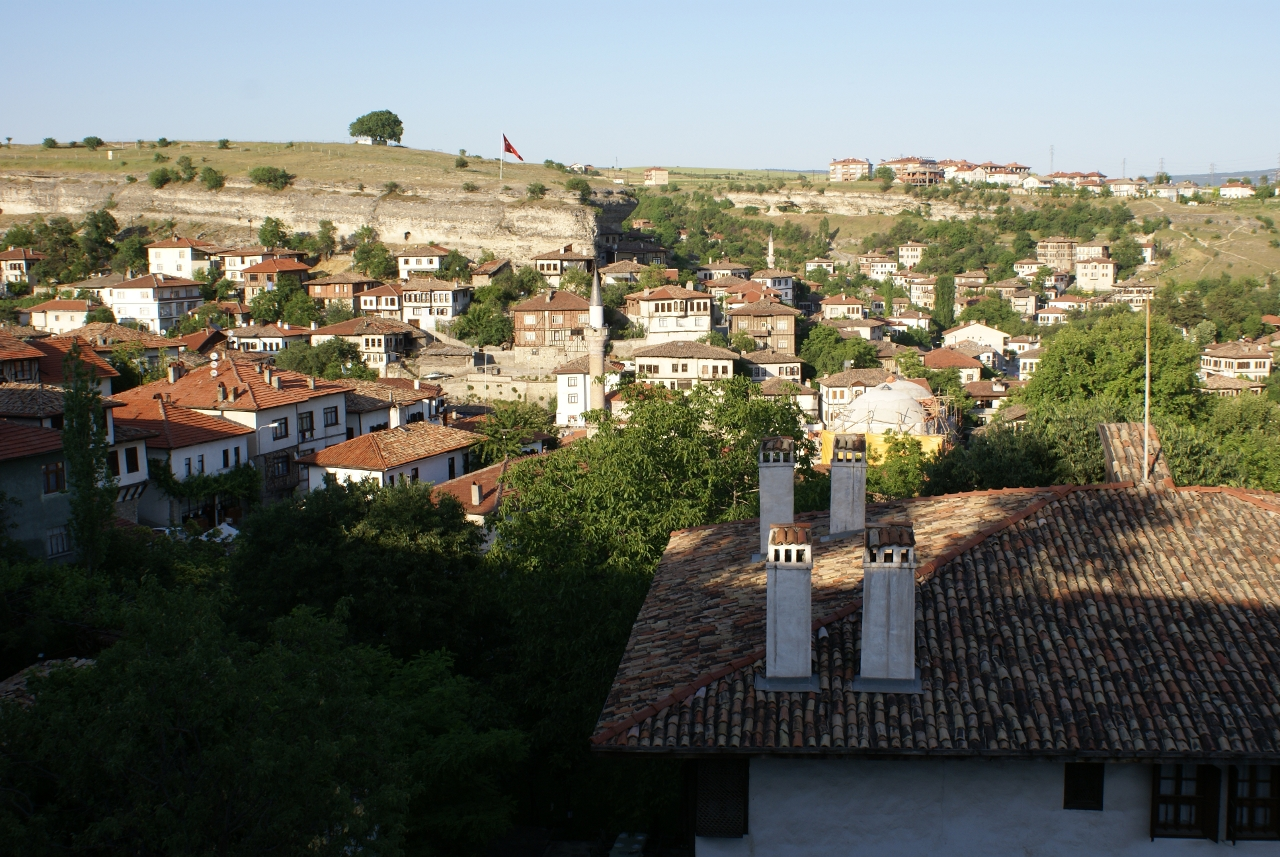 Altstadt von Safranbolu